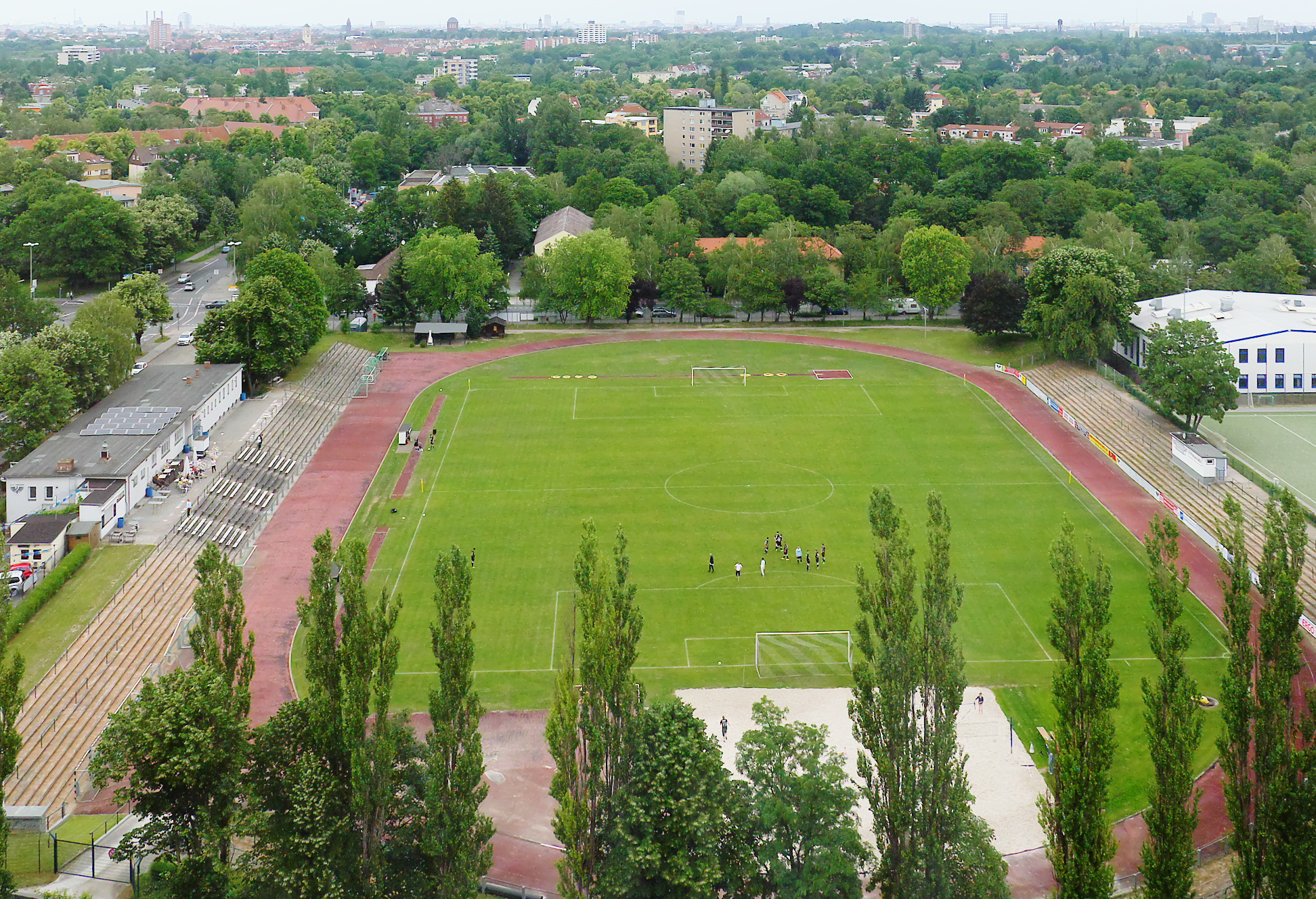 Preussenstadion in Berlin-Lankwitz von Süden gesehen.